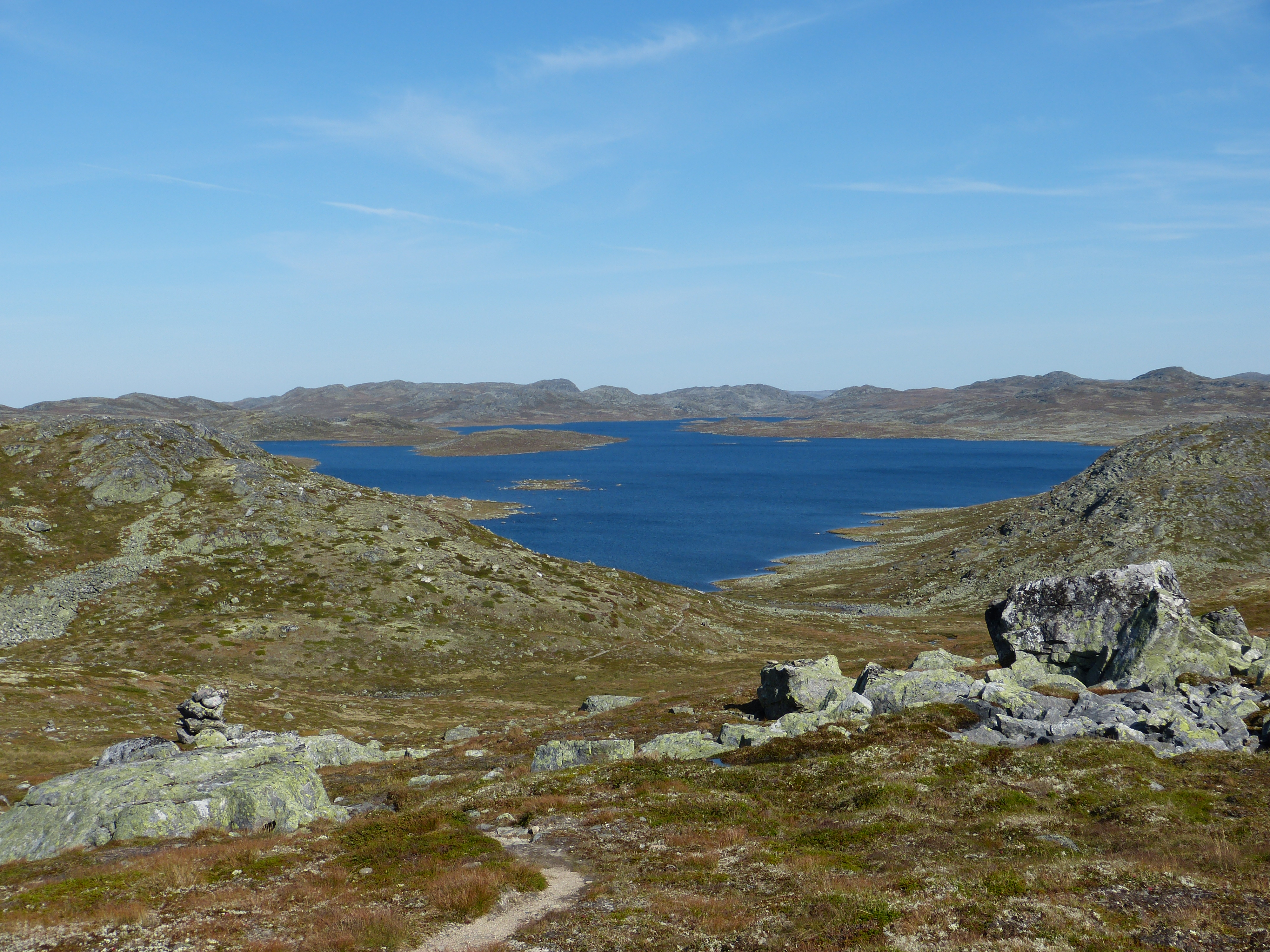 Tag 8: Viuvatnet.